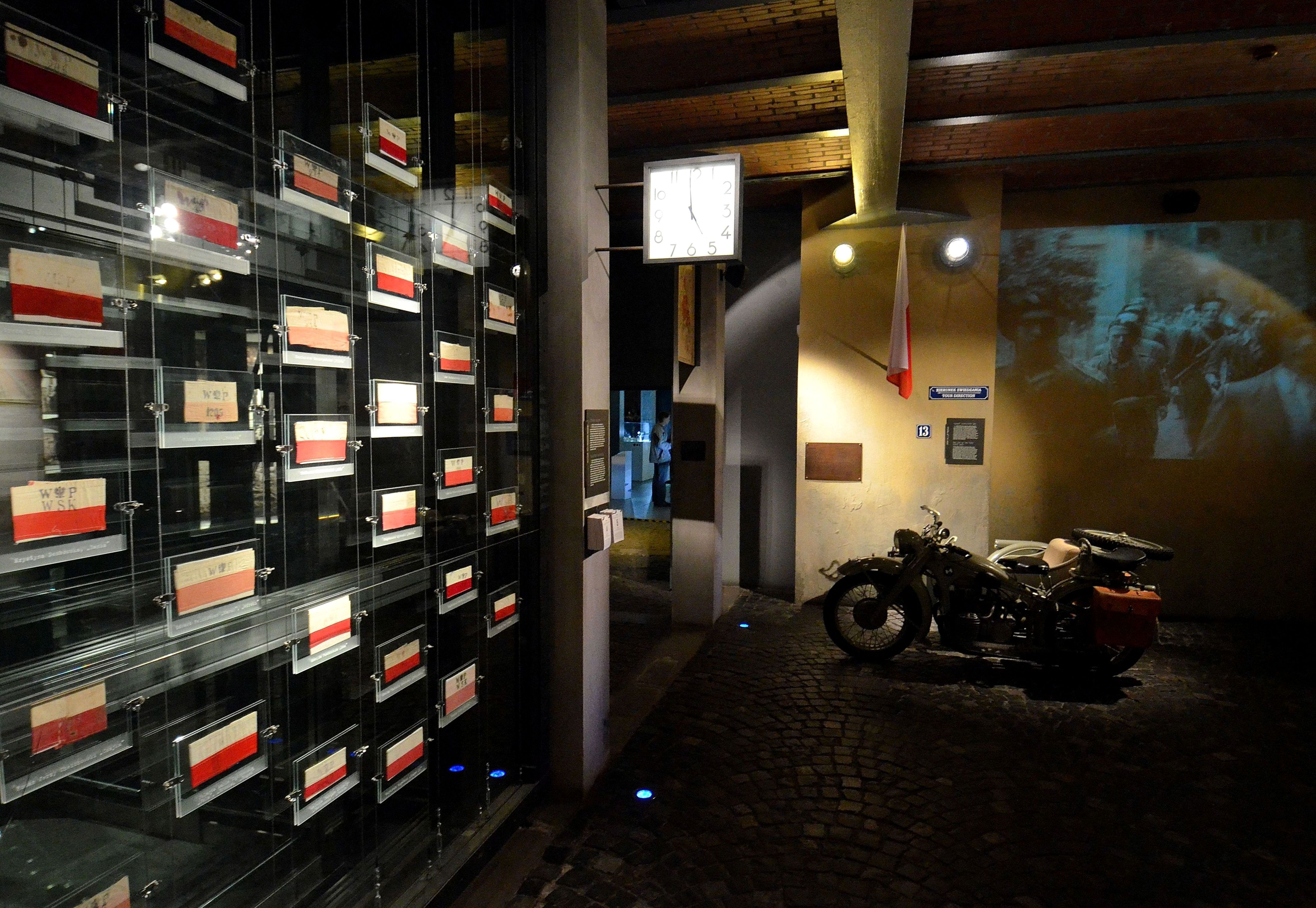 Muzeum Powstania Warszawskiego